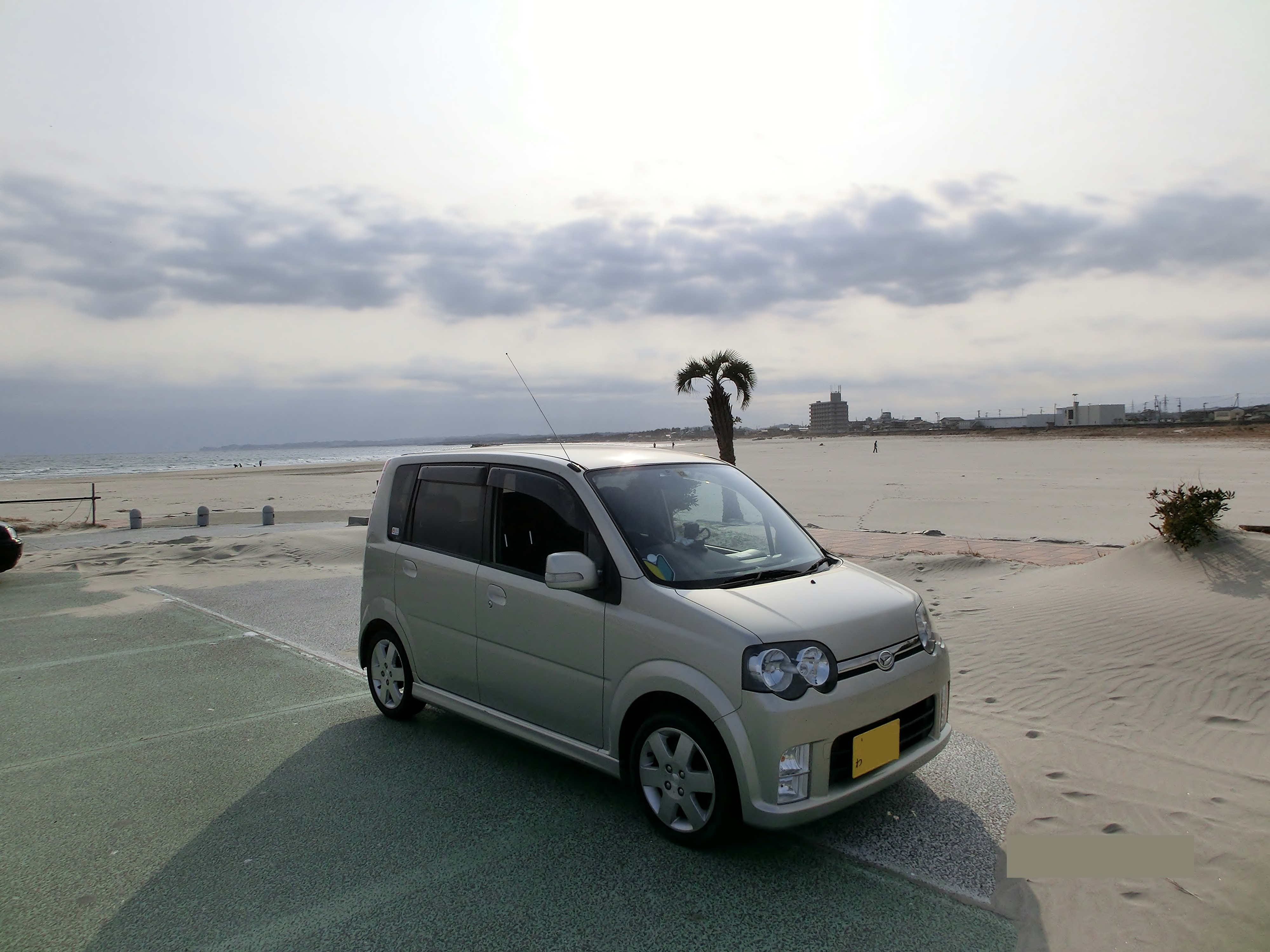 平成１８年式 ムーヴカスタムＲリミテッド レンタカー